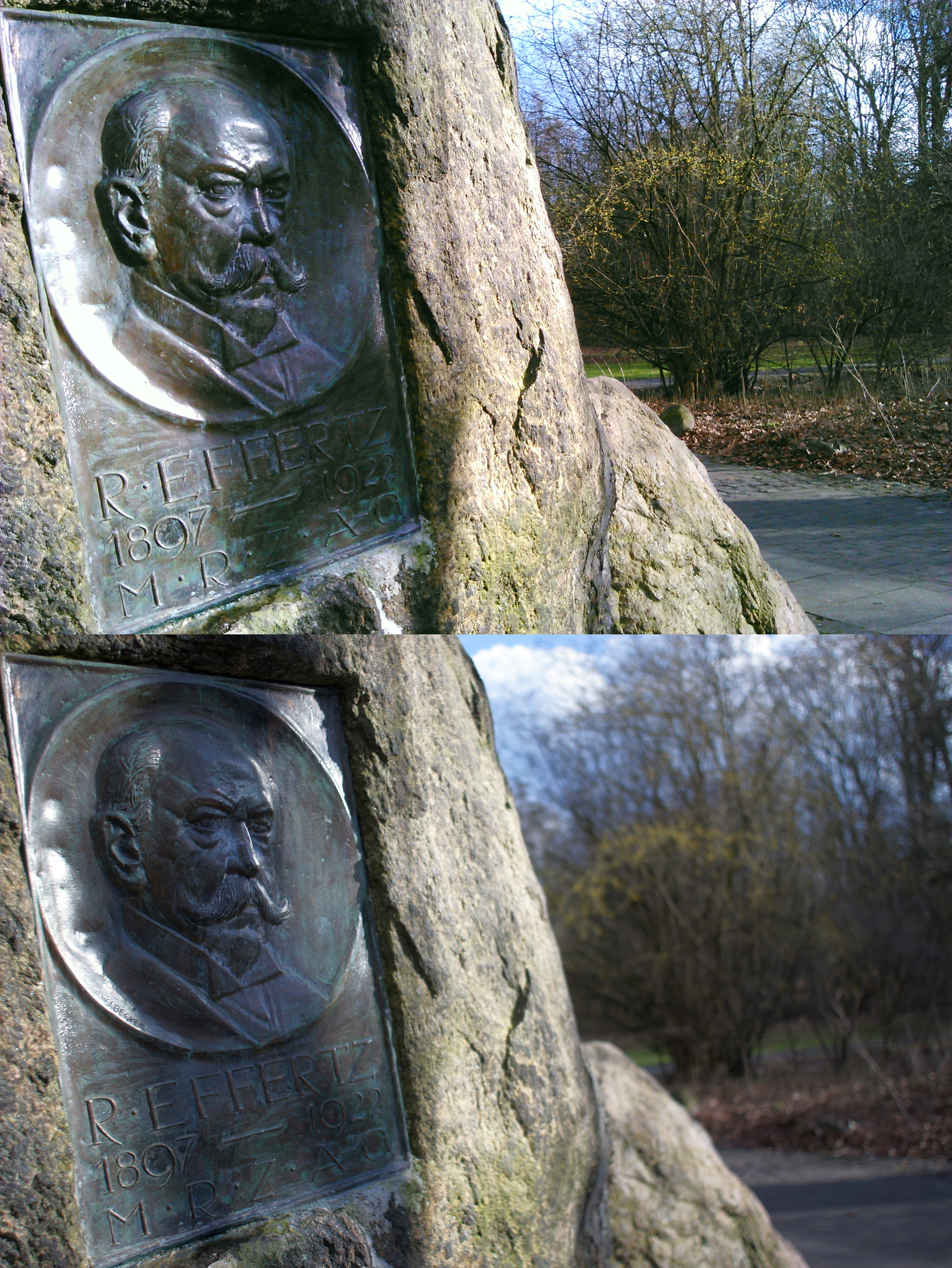 Effertz-Denkmal in Unna. Vergleich des Schärfeverlaufs zwischen einem Mobiltelefon mit kleinem Sensor und f2.8/3.4mm Brennweite und einer Kamera mit Sensor in APS-C-Größe und Objektiv f2.8/24mm. Beide Objektive entsprechen etwa 35mm Brennweite beim Kleinbildformat.